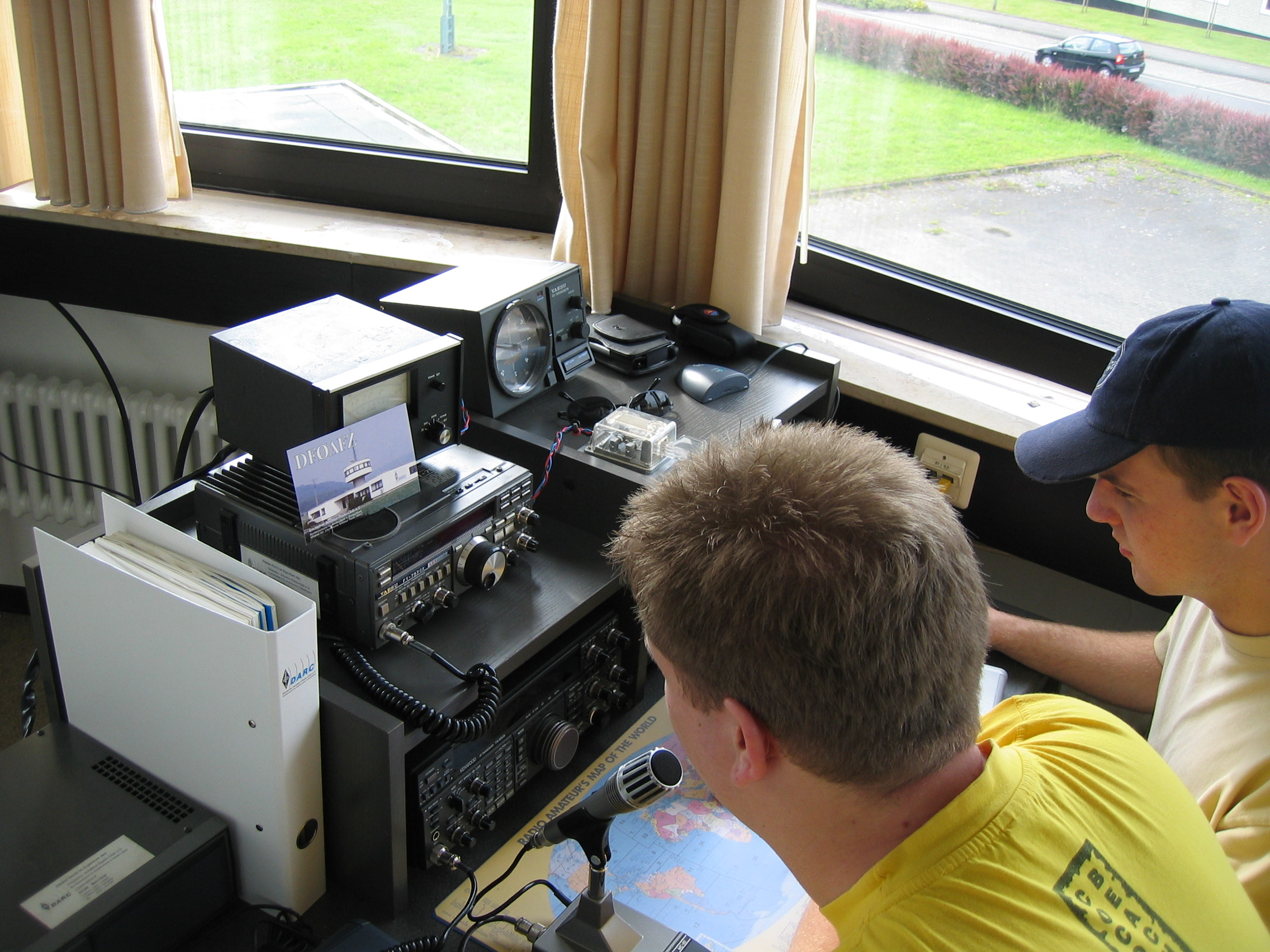 DH6WS & DH9DP